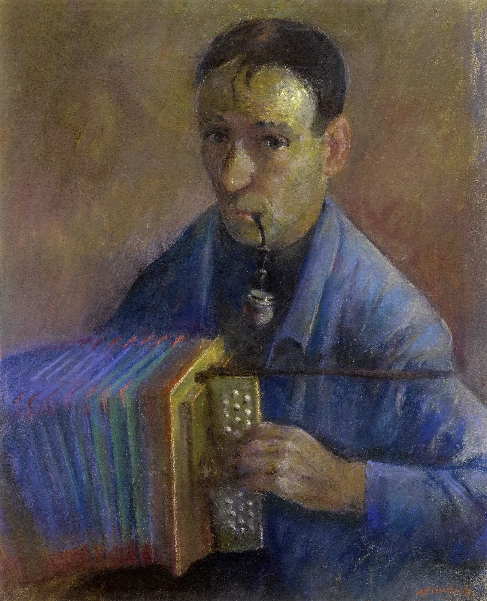 Selbstportrait mit Handorgel. Pastell auf Papier. Unten rechts signiert: Neuhaus. 56 x 46 cm.